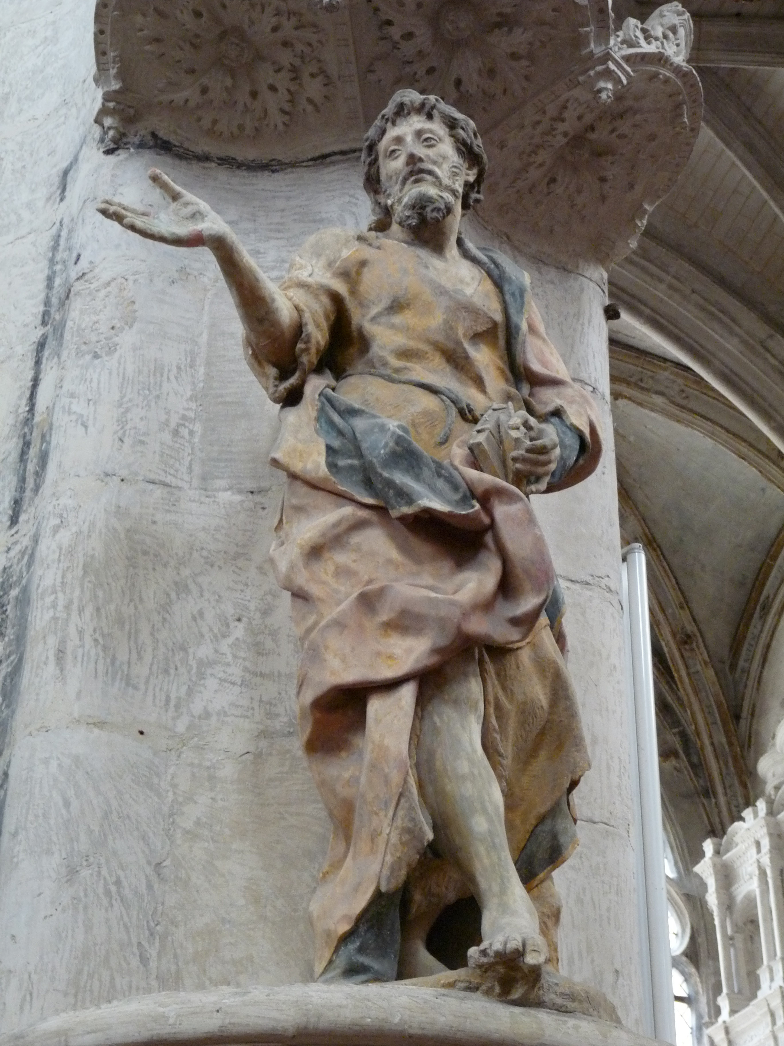 Saint-Jean-Baptiste. Statue de l'église Saint-Pantaléon de Troyes attribuée à Dominique Florentin (v.1555-1560).